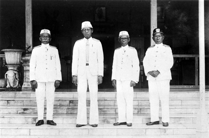 Repronegatief. Sultan Aji Muhammad Parikesit van Kutai (1910/20- 1959/ overleden 1981). Met naast hem de prinsen vlnr. Pangeran Sosronegoro, Aji Pangeran Ratu en Aji Pangeran Perdana staande op de trappen van de oude kraton.. Sultan Ali Muhammad Parikesit en andere prinsen van Kutai, Borneo